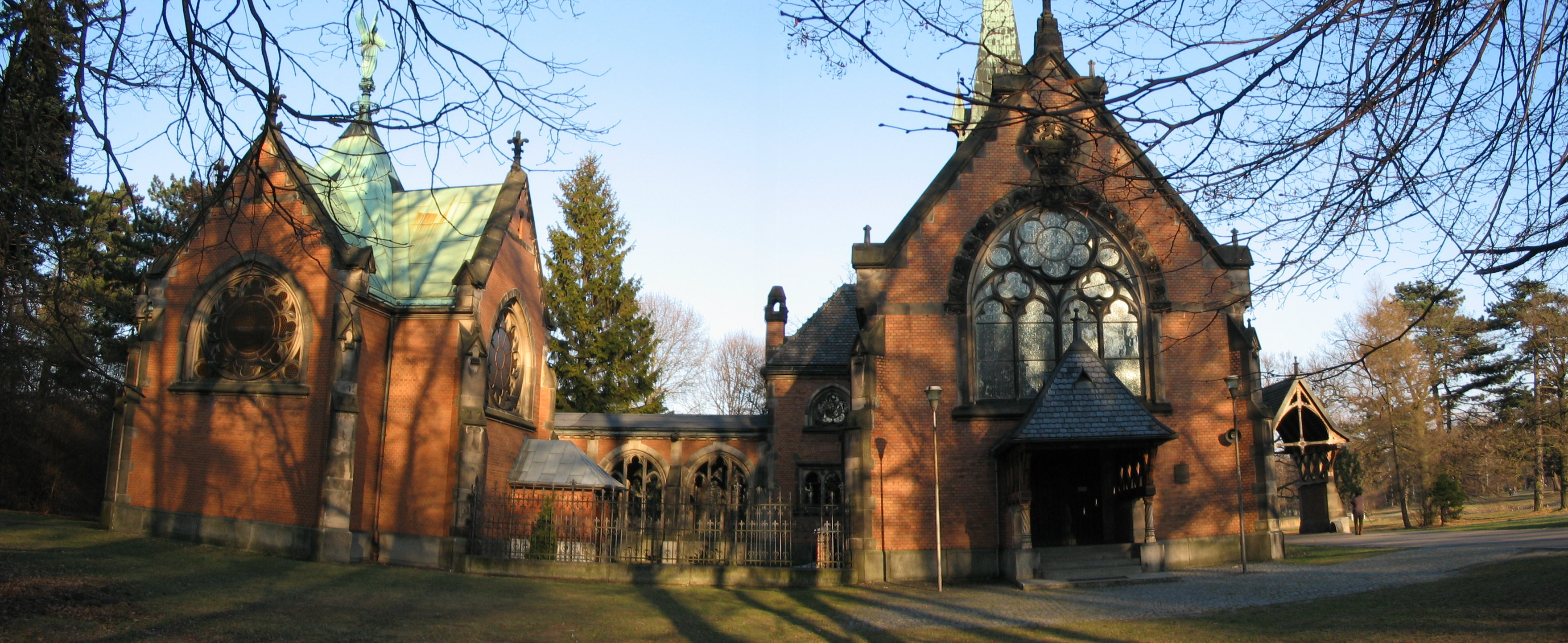 Świerklaniec - kościół w parku (powiat tarnogórski)